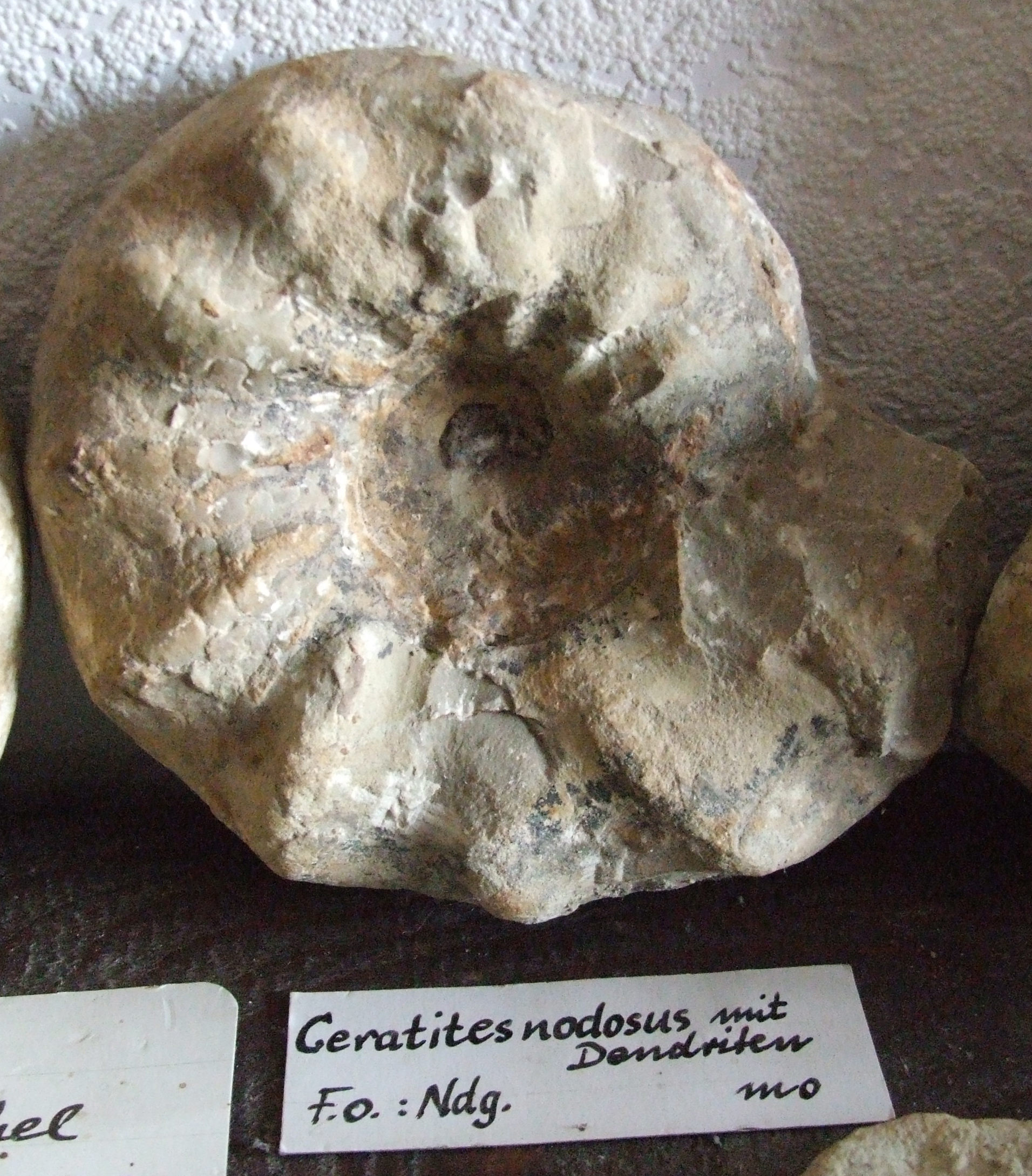 Ceratites nodosus mit Dentriten, Fundort Niedergailbach